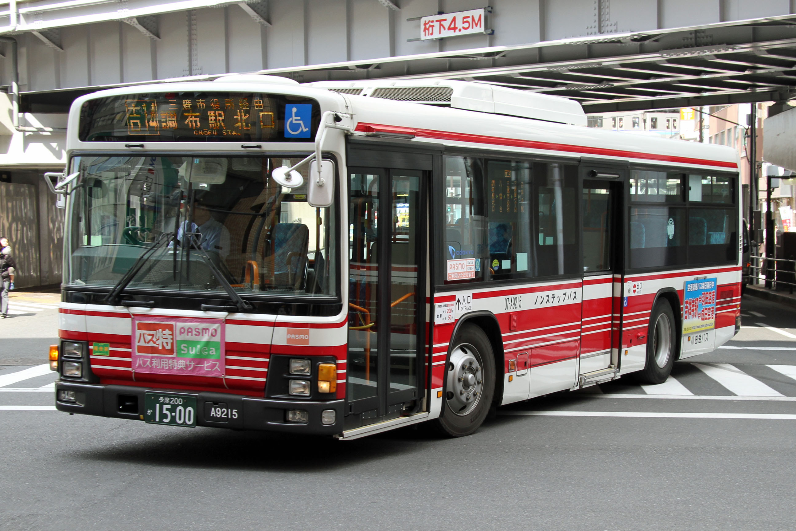 Odakyu Bus car 小田急バスの車両